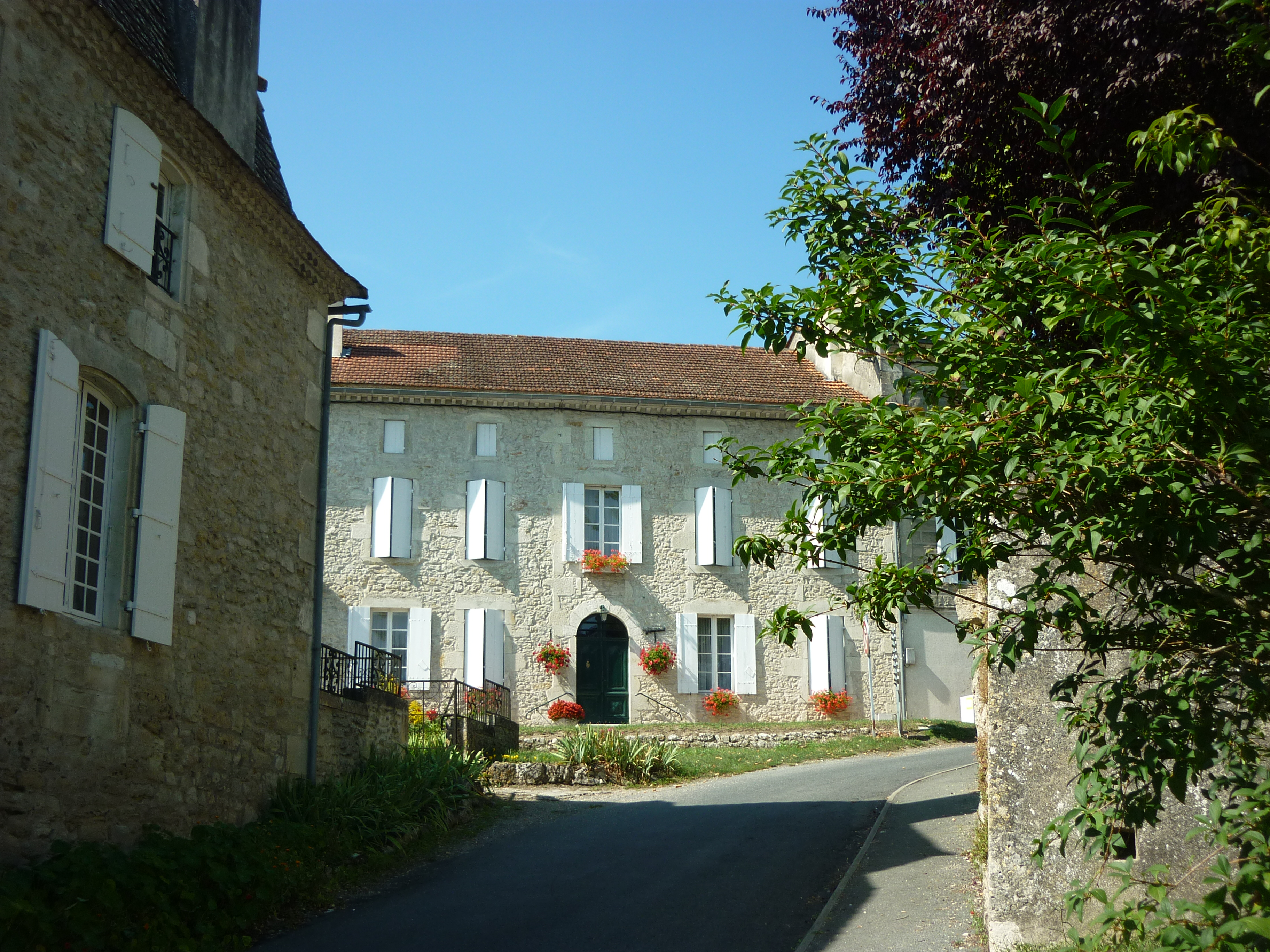 Rue de Saint-Méard-de-Gurçon (Dordogne).